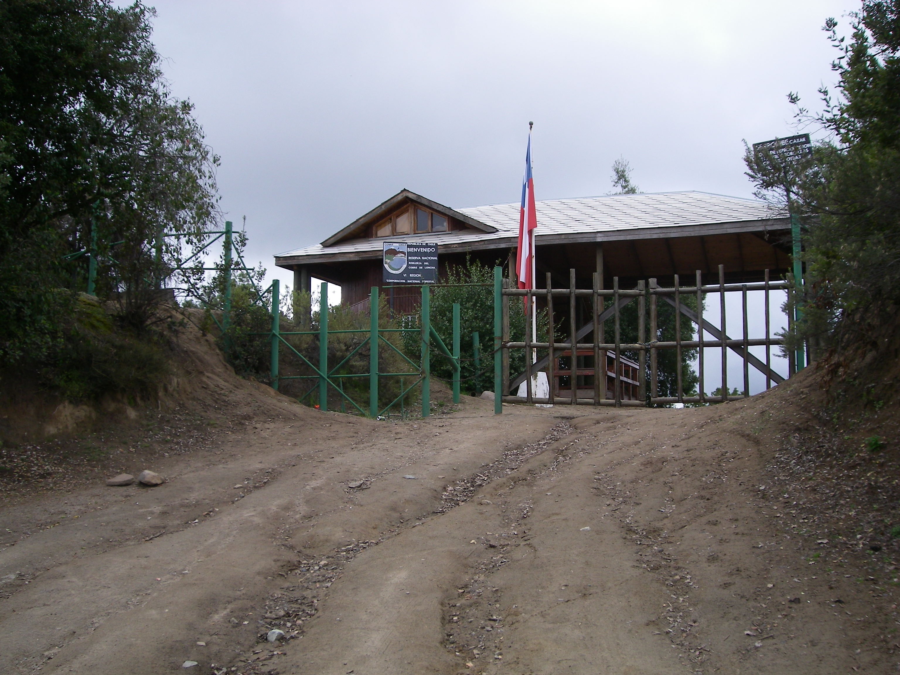 Roblería del cobre de Loncha (Conaf).